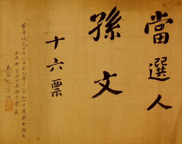 孙文当选中华民国临时大总统选票